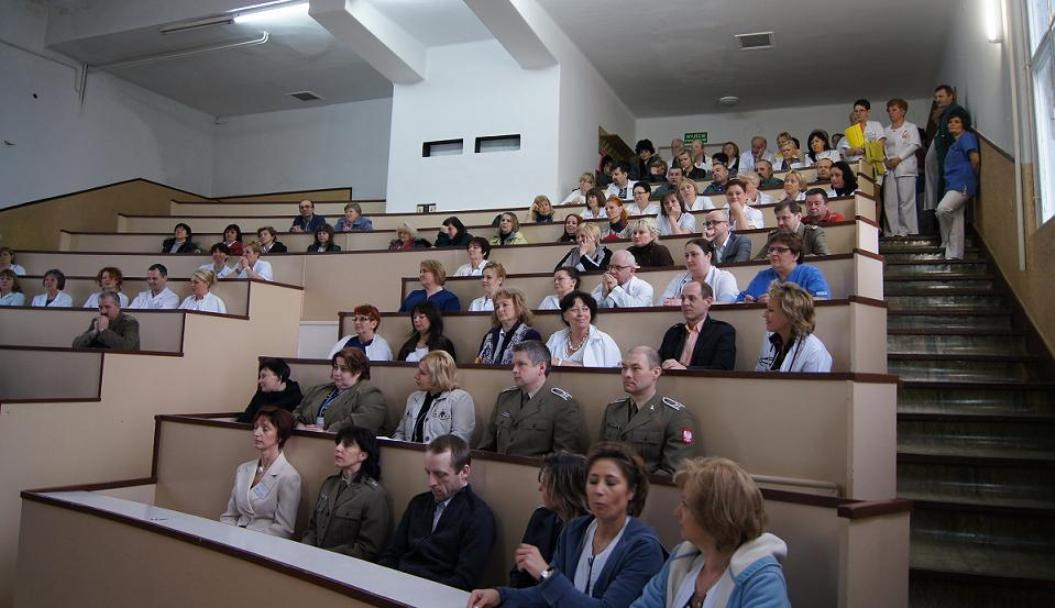 Szczecin, 2012r. Personel 109 Szpitala Wojskowego